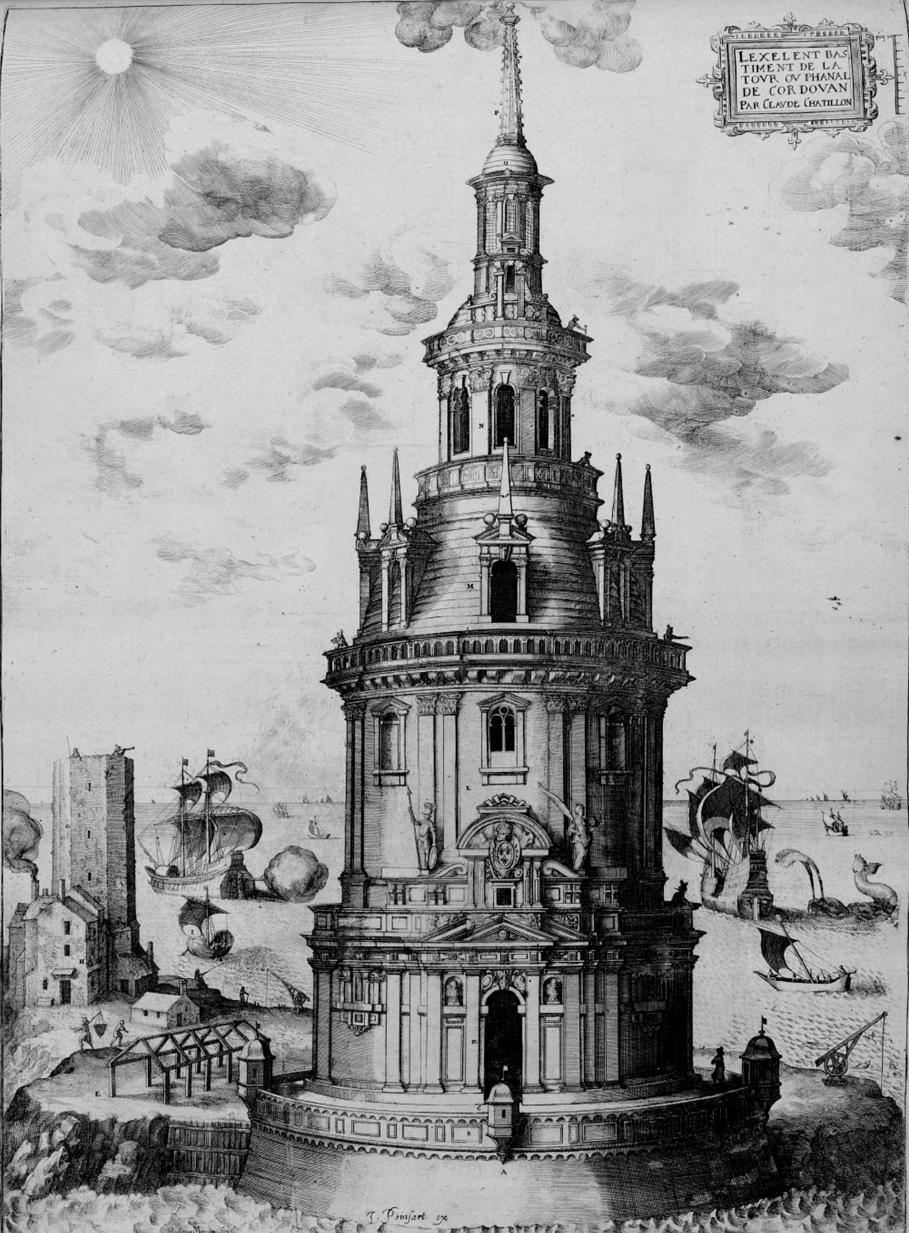 Le phare de Cordouan sous le règne d'Henri IV. Gravure de Claude Chastillon.